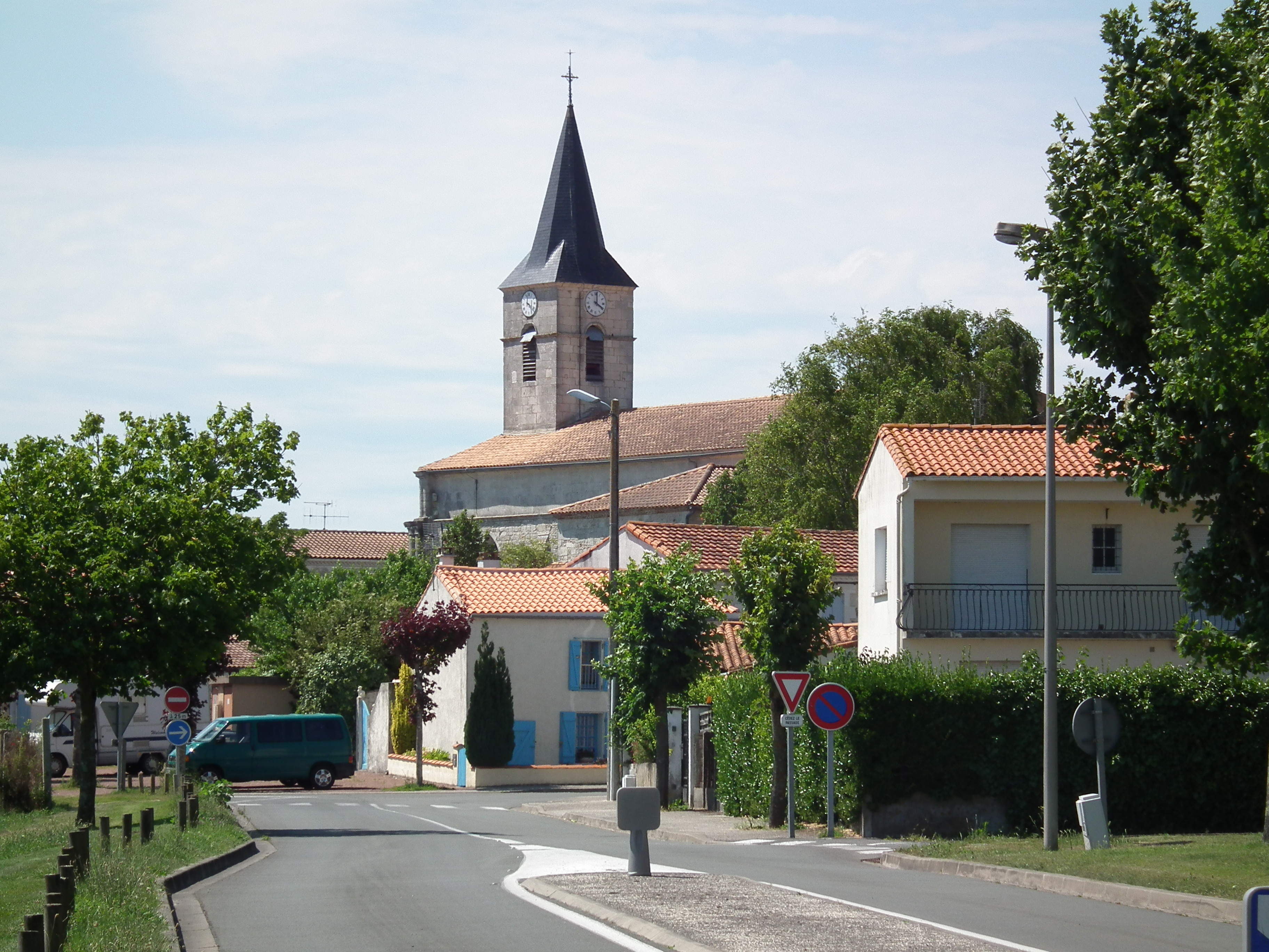 Entrée d'Arvert en venant d'Etaules